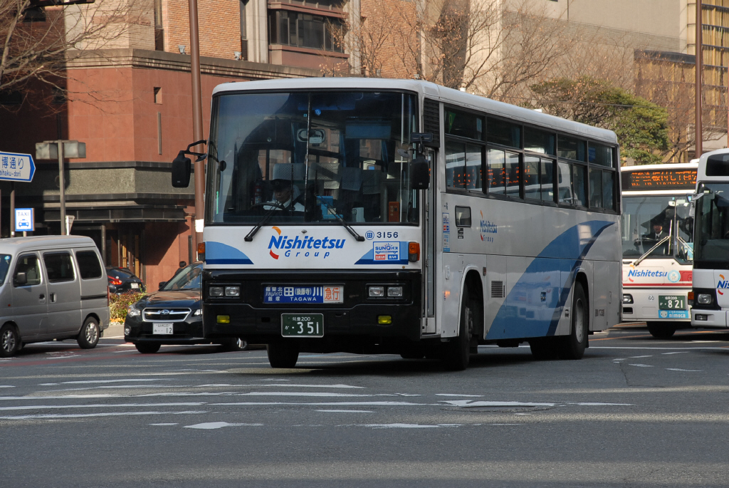 過渡期の塗装 博多駅前にて、2015-3-17撮影